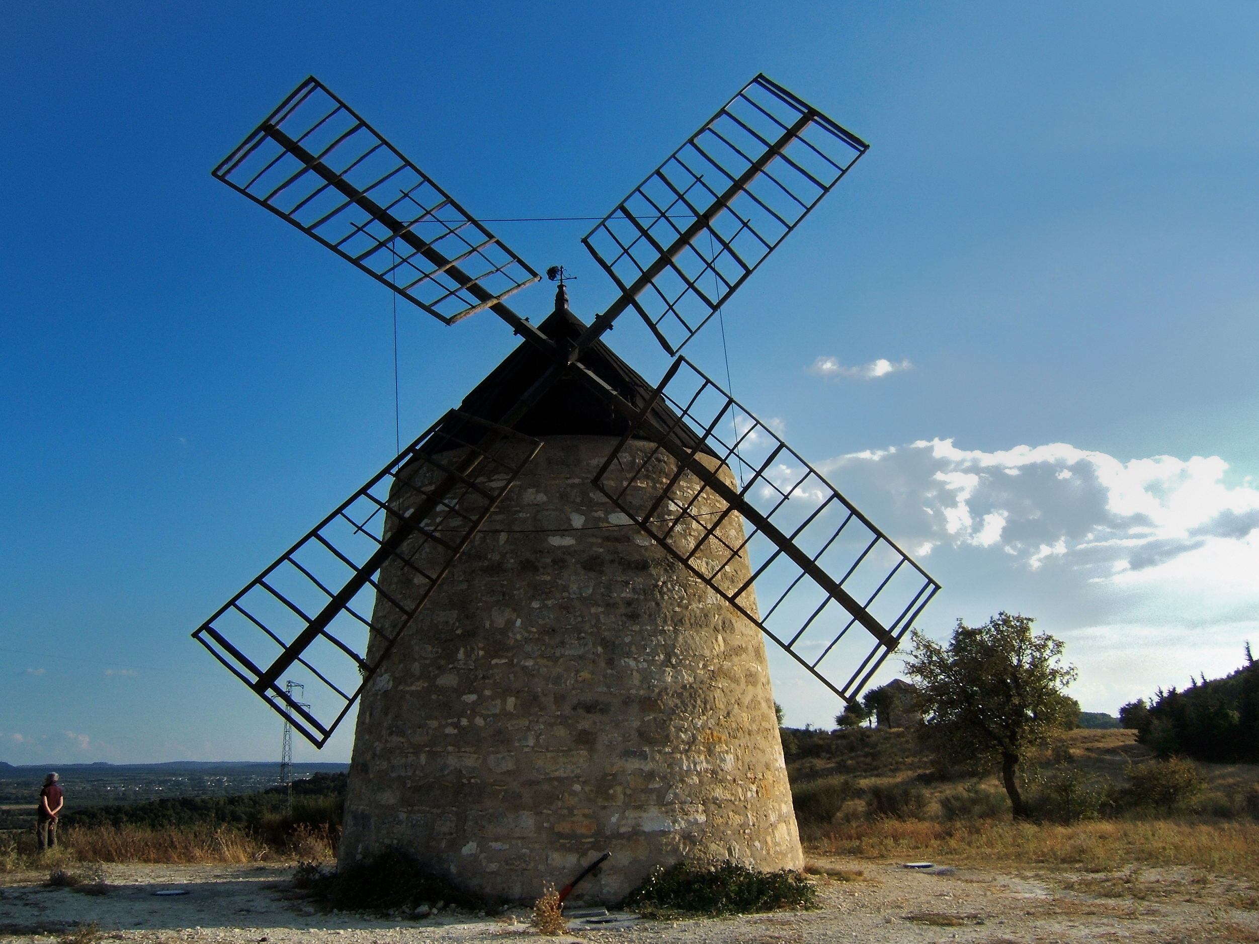 moulin